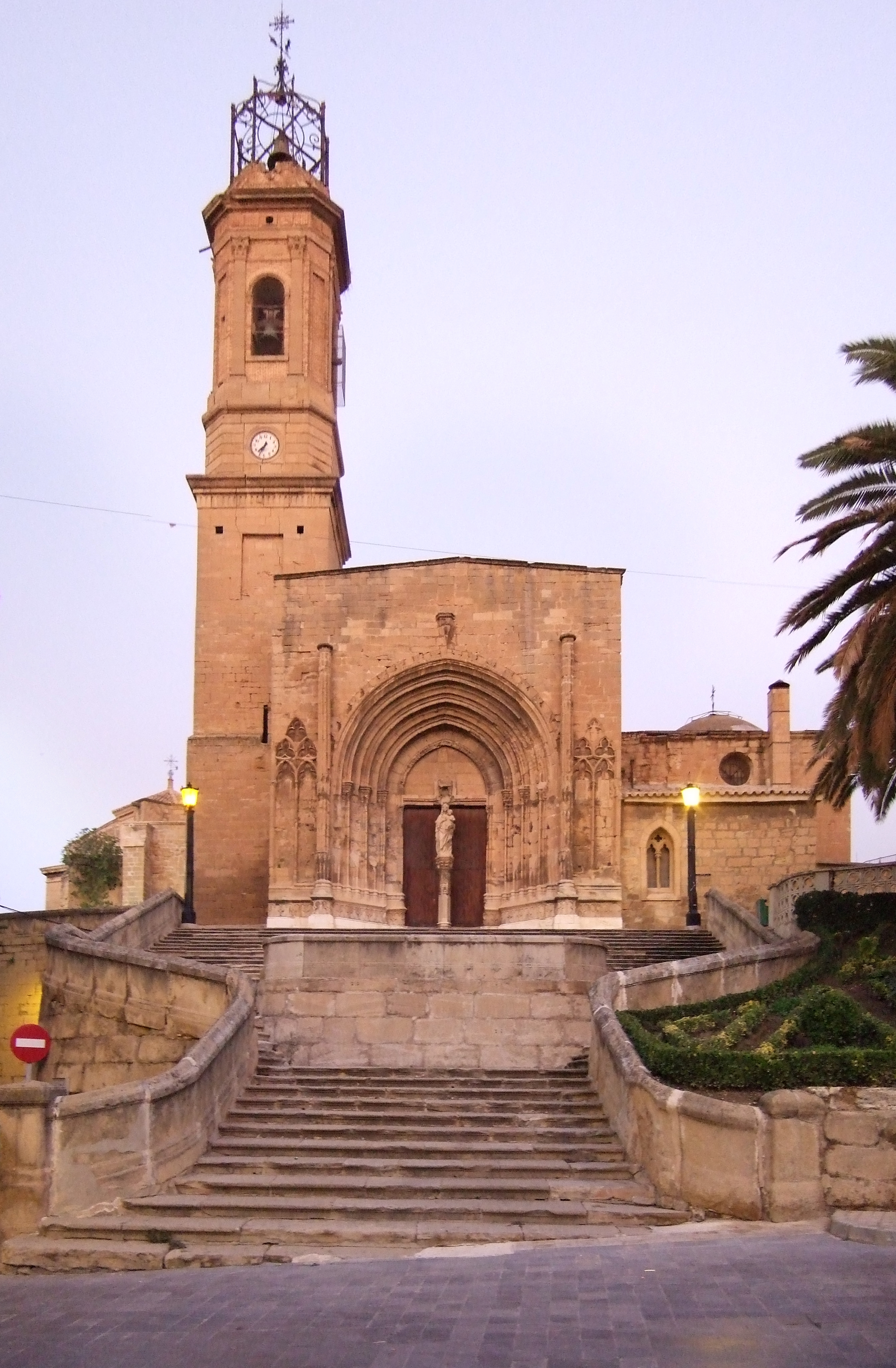 Caspe - Colegiata de Sta María la Mayor siglos XII al XVIII; estilo Gotico - Fachada